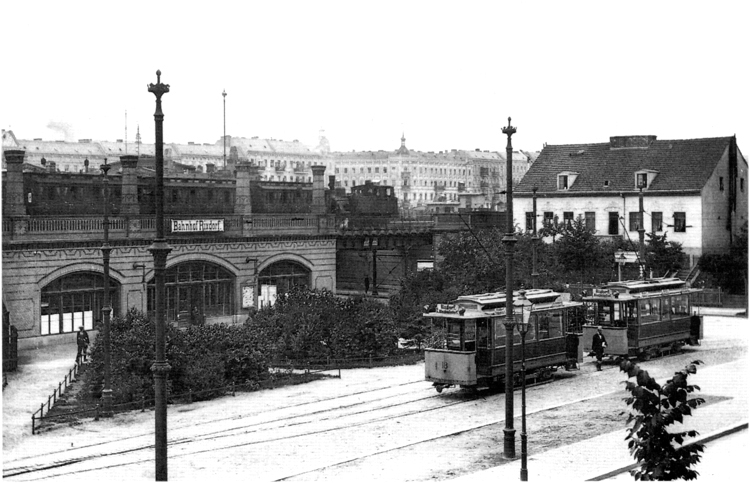 Straßenbahnwagen der Südlichen Berliner Vorortbahn am Bahnhof Rixdorf (heute Berlin-Neukölln)